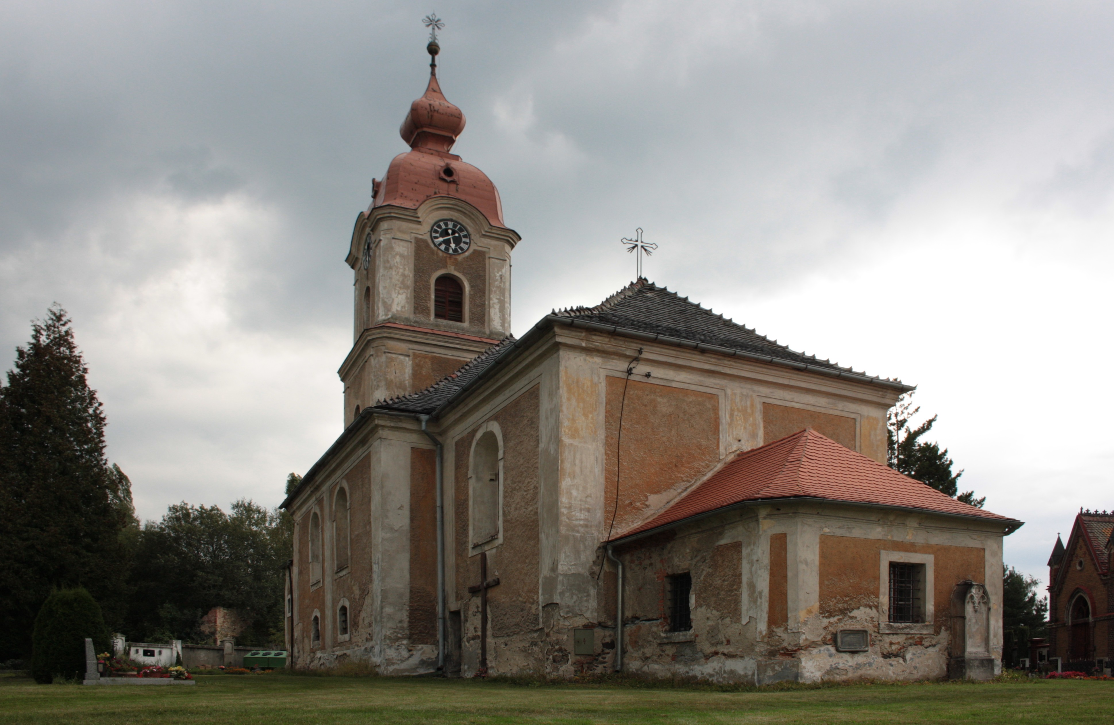 This photograph was taken with a DSLR from WMCZ's Camera grant. Kostel Všech svatých v Kunraticích poblíž Frýdlantu v okrese Liberec.